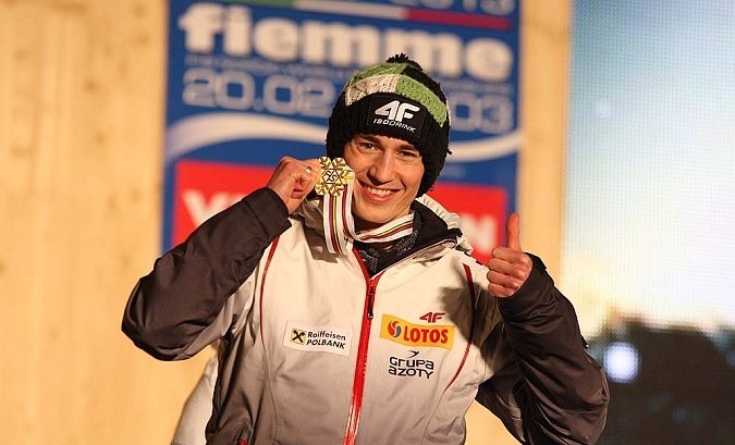 Dekoracja medalowa konkursu indywidualnego mężczyzn na skoczni K-120